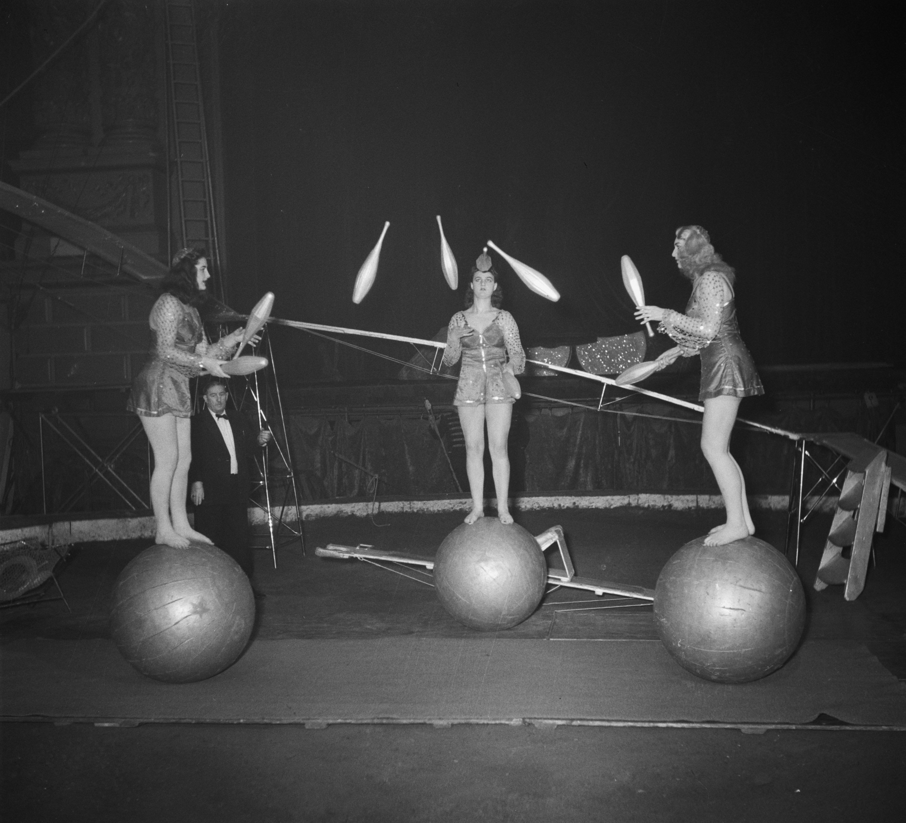 Collectie / Archief : Fotocollectie Anefo Reportage / Serie : [ onbekend ] Beschrijving : Circus Strassburger diverse opnamen Datum : 22 januari 1952 Trefwoorden : OPNAMEN Instellingsnaam : Strassburger Circus Fotograaf : Noske, J.D. / Anefo Auteursrechthebbende : Nationaal Archief Materiaalsoort : Negatief (zwart/wit) Nummer archiefinventaris : bekijk toegang 2.24.01.03 Bestanddeelnummer : 904-9388